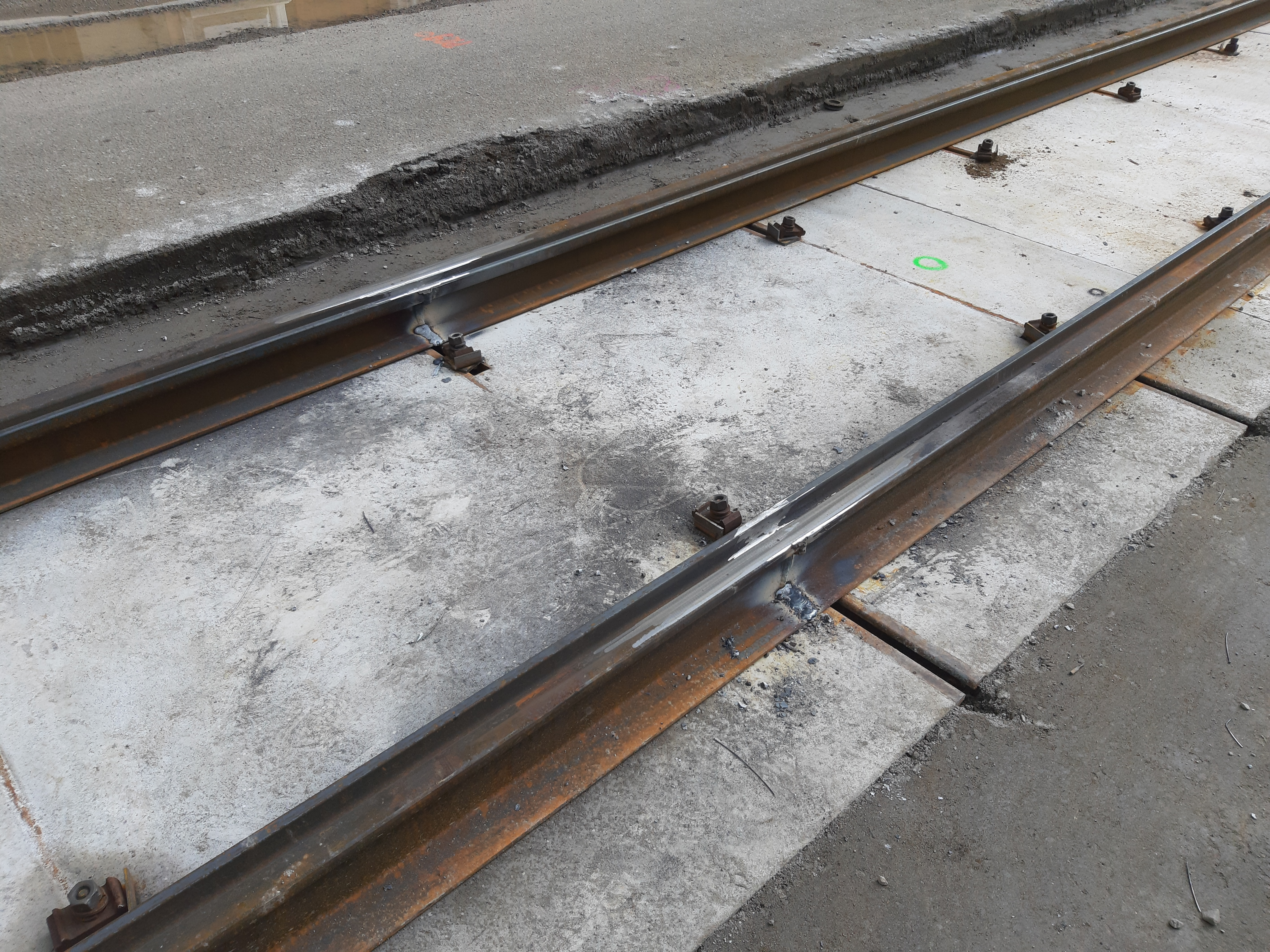 Brno, Grohova: nové tramvajové kolejiště. Koleje byly svařeny termitem, a následně obroušeny.